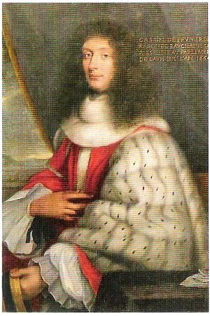 Gabriel Prunier-de-Saint-André (1631-1696), président au parlement du Dauphiné.